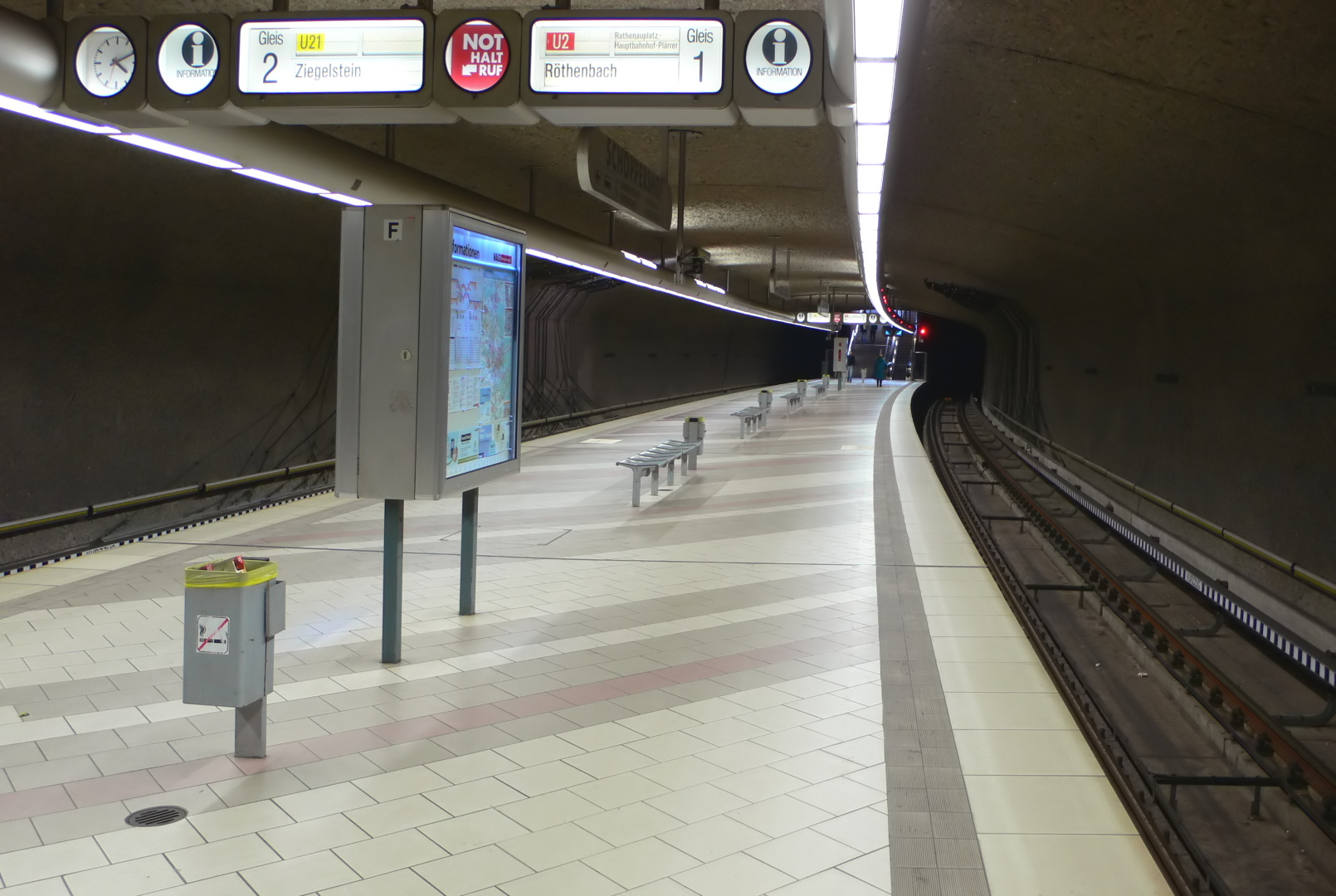 U-Bahnhof Schoppershof der U-Bahn Nürnberg, Bahnsteigebene, Blick von Nordosten